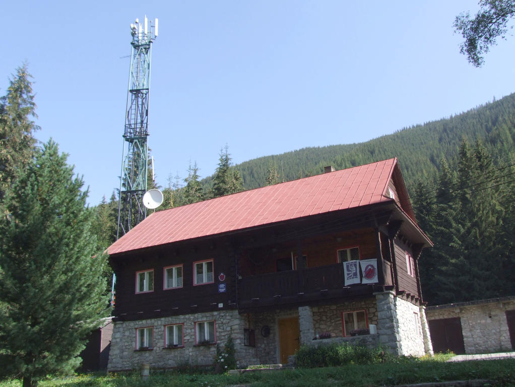 Zwierówka (Zuberec, West Tatra Mountains)